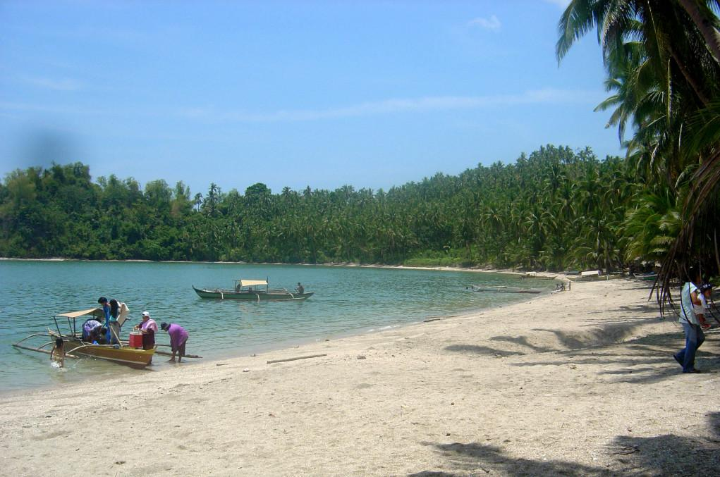 Panapukan Beach, Taranangnan,Samar